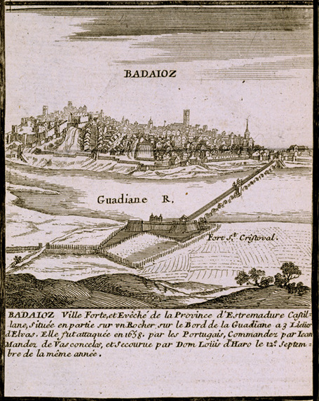 “Badaioz, Ville Forte et Evêché de la Provice d’Estremadure Castillane, située en partie sur un Rocher, sur le Bord de la Guadiane a 3 lieües d’Elvas. Elle fut attaquée en 1658 par les Portugais, Commandez par Iean Mandez de Vasconcelos, et securue par Don Loüis d’Haro le 12e septembre de la même année.”